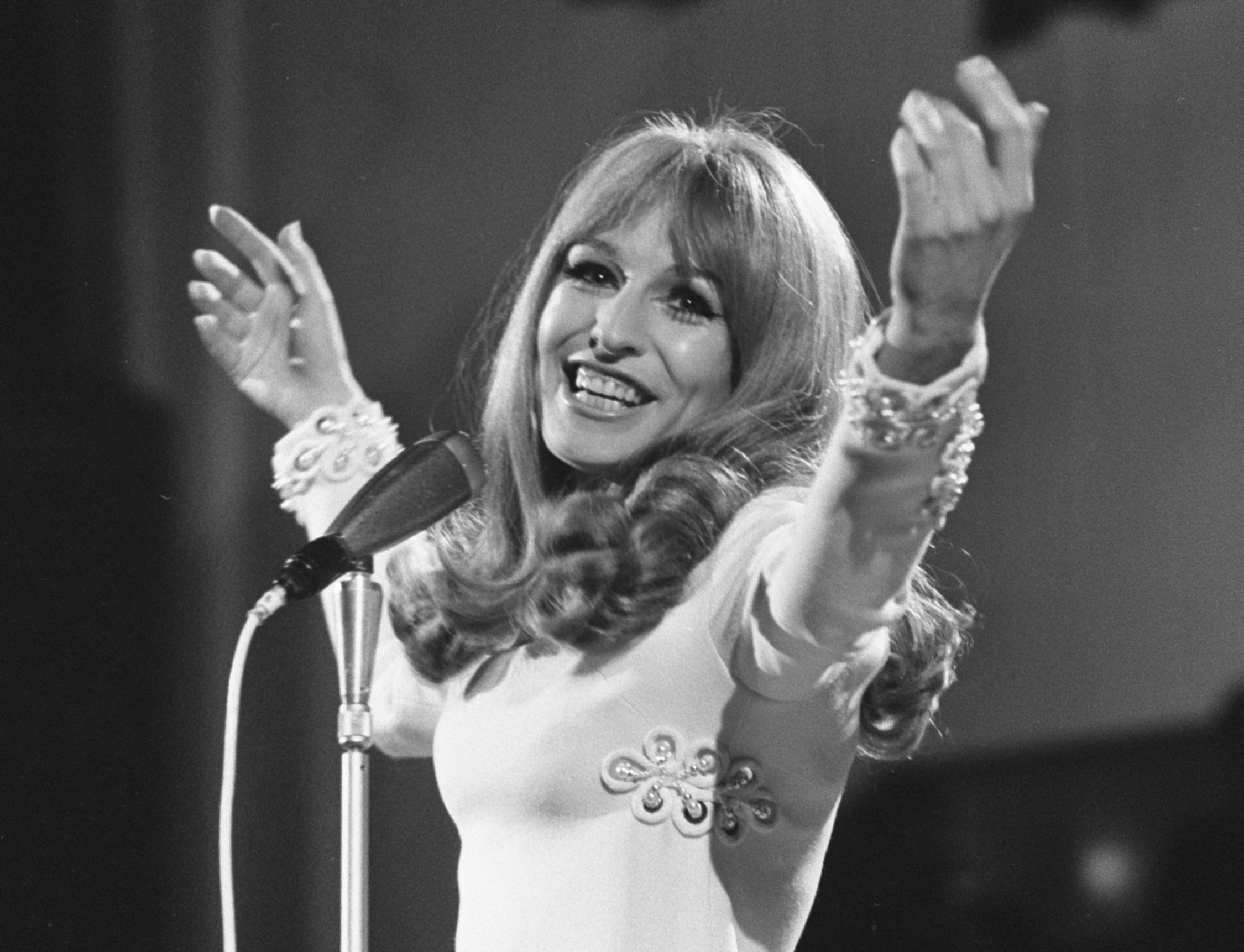 Collectie / Archief : Fotocollectie Anefo Reportage / Serie : [ onbekend ] Beschrijving : Grand Gala du Disque in RAI Amsterdam. Liesbeth List tijdens optreden Datum : 27 februari 1970 Locatie : Amsterdam, Noord-Holland Persoonsnaam : List, Liesbeth Fotograaf : Mieremet, Rob / Anefo Auteursrechthebbende : Nationaal Archief Materiaalsoort : Negatief (zwart/wit) Nummer archiefinventaris : bekijk toegang 2.24.01.05 Bestanddeelnummer : 923-3040